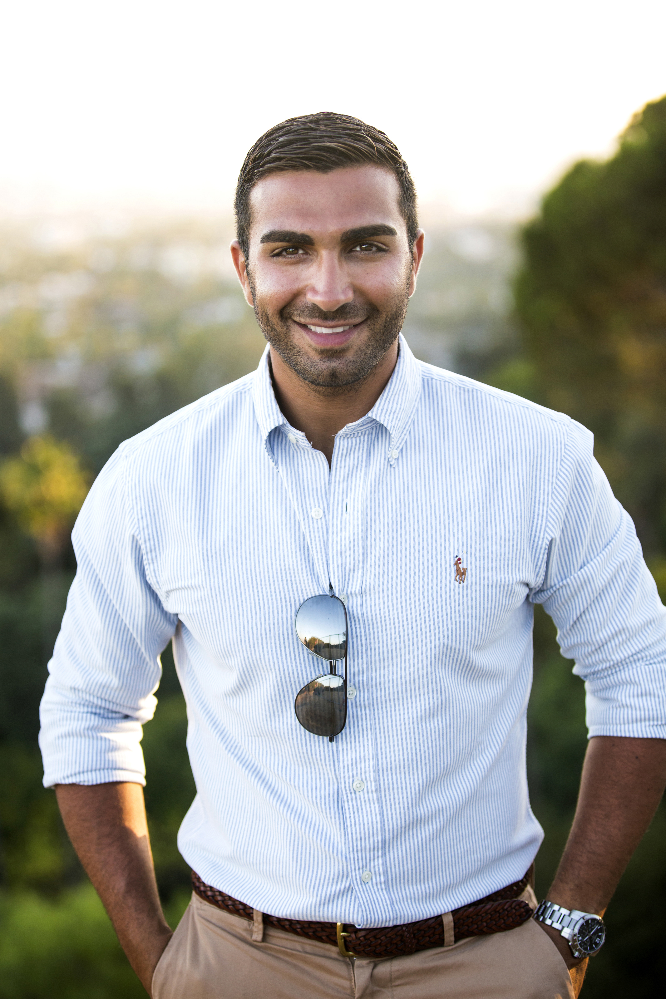 Konditorn Roy Fares.